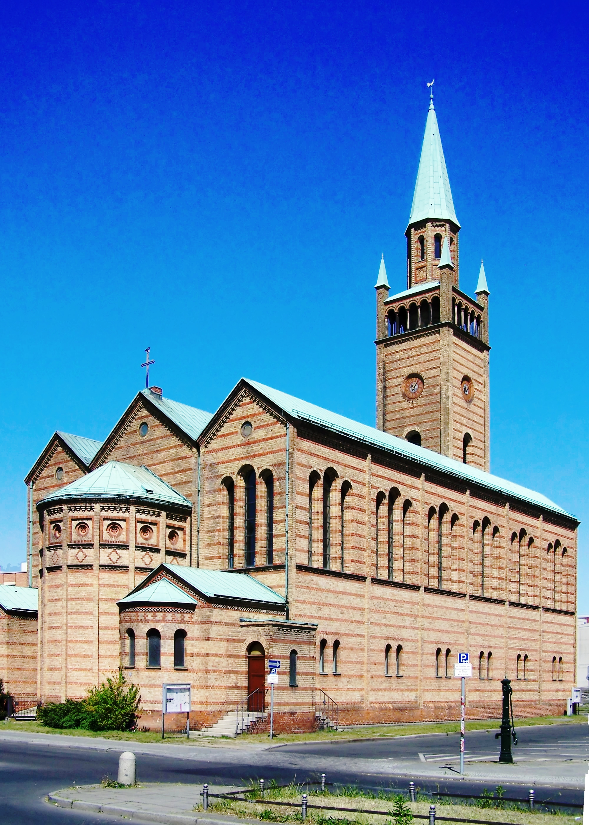 Sankt-Matthäuskirche in Berlin